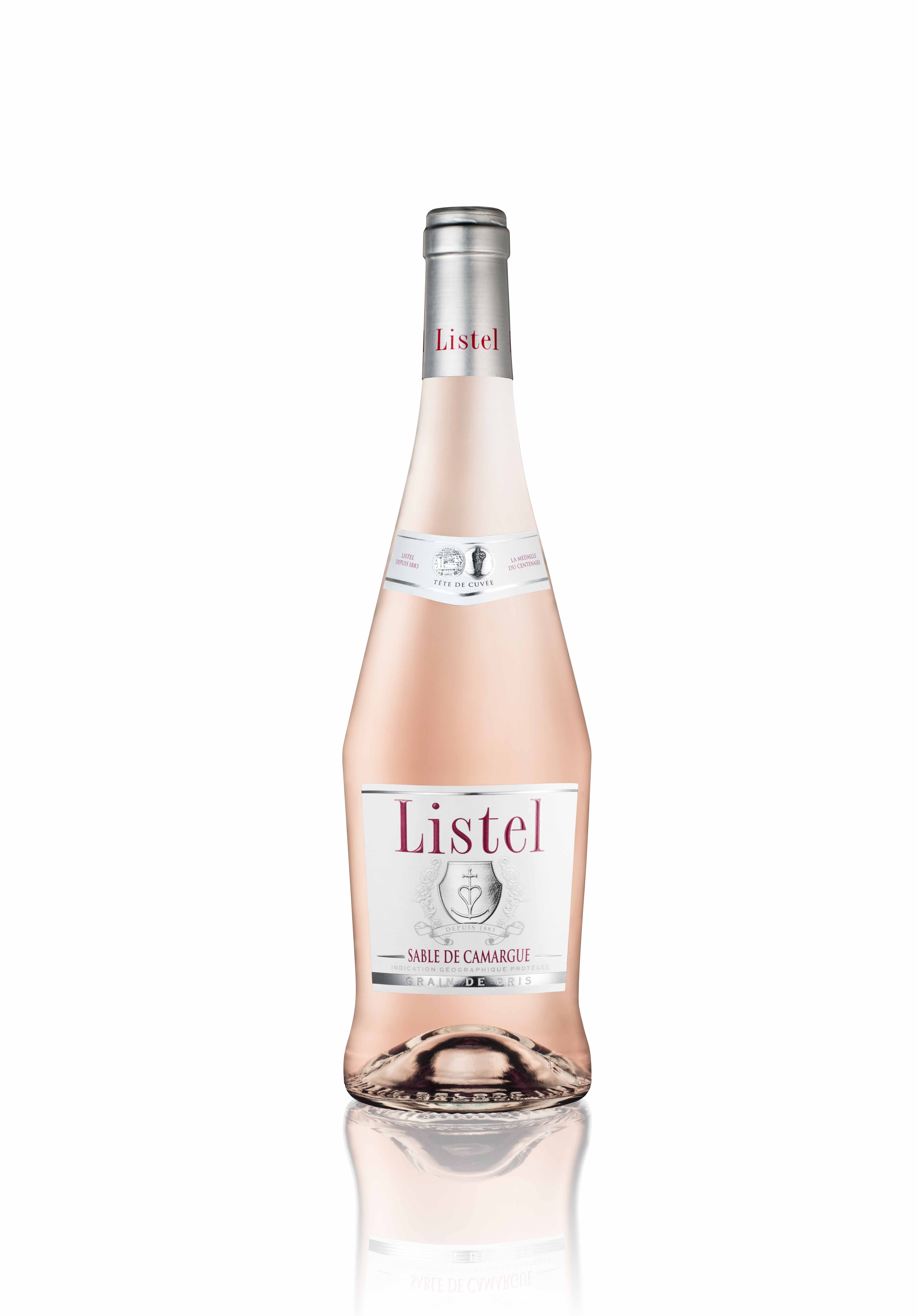 Listel centenaire Grain de Gris